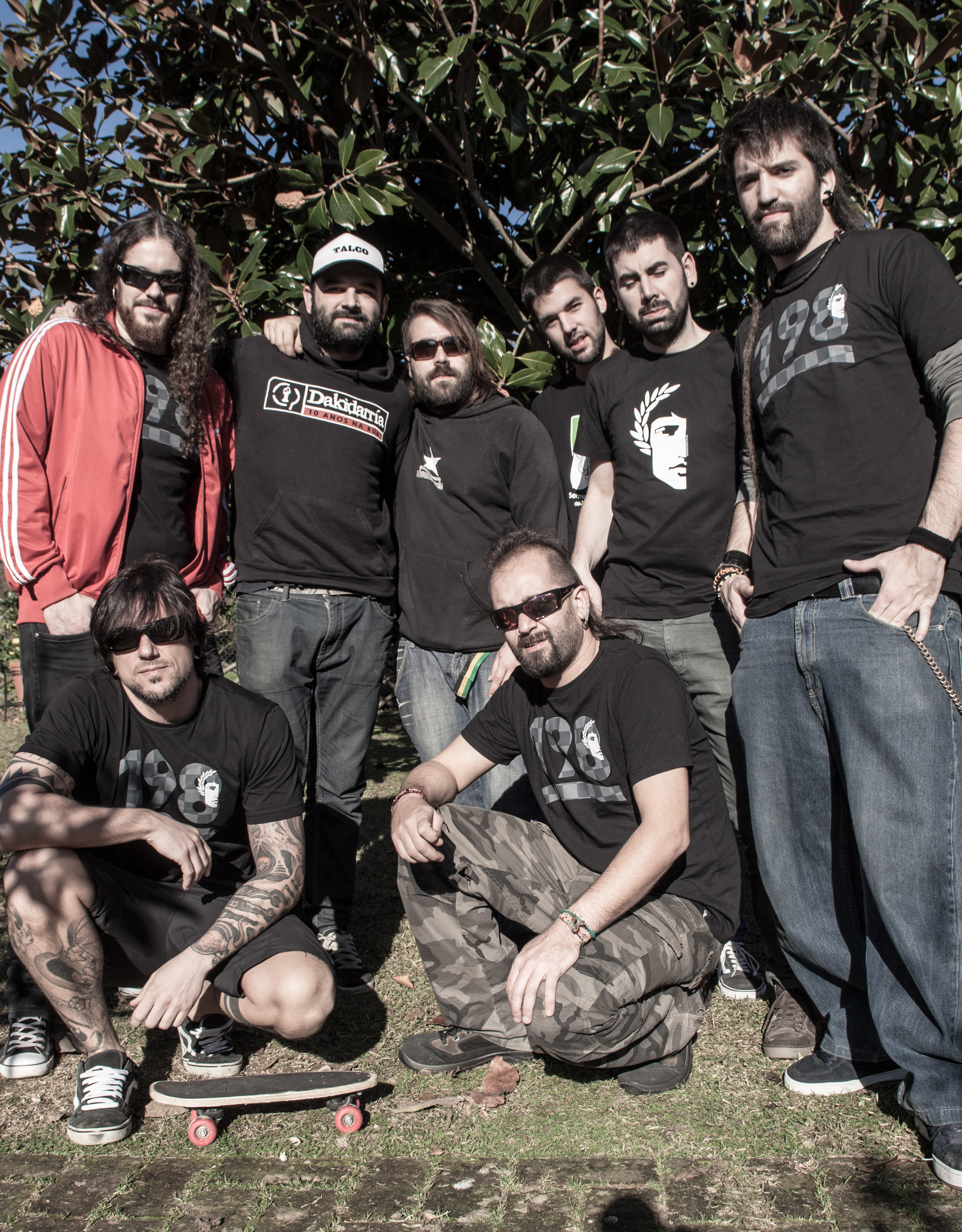 Formación de Dakidarría no ano 2015